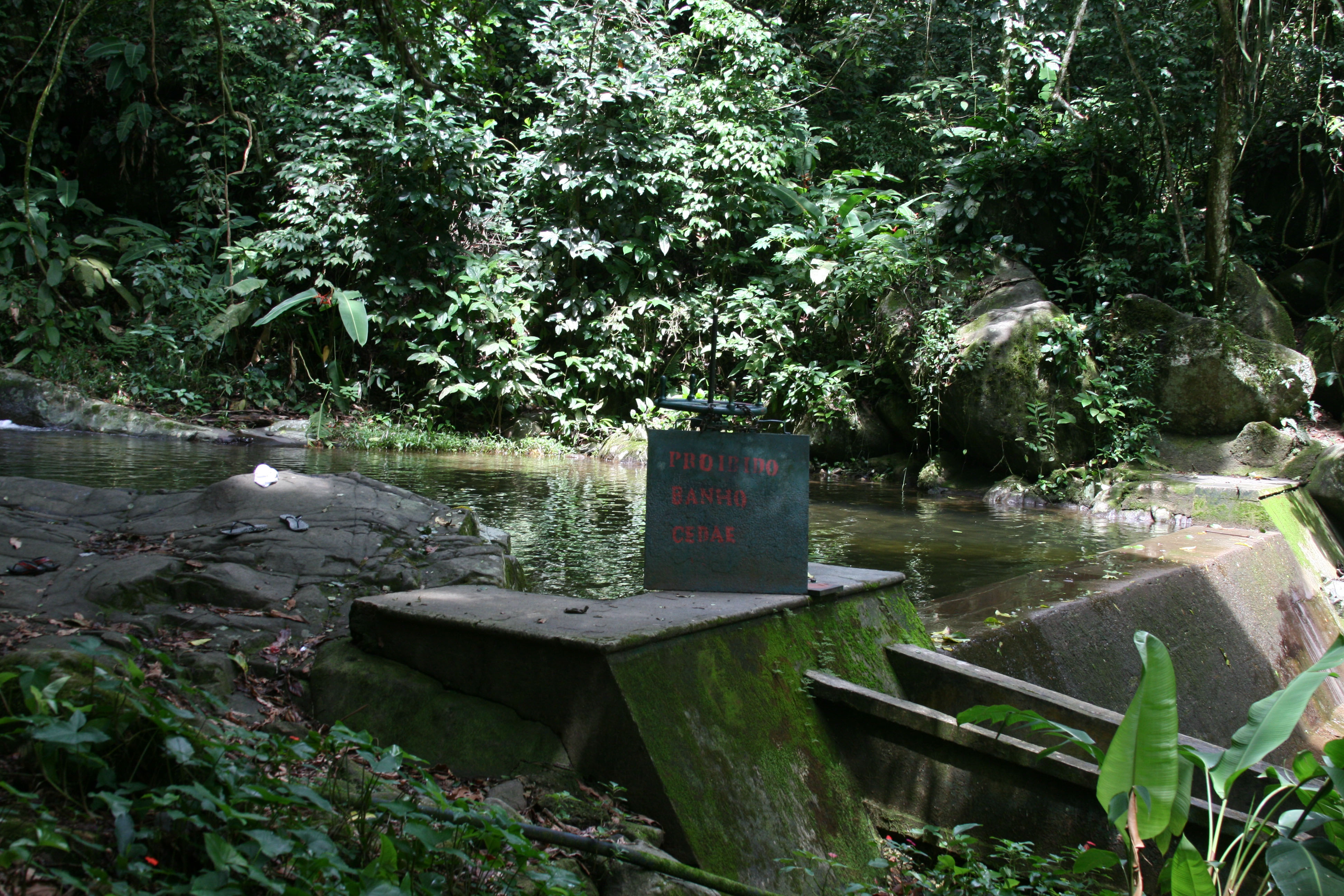 Parque estadual da Pedra Branca - Núcleo Pau da Fome - Represa.